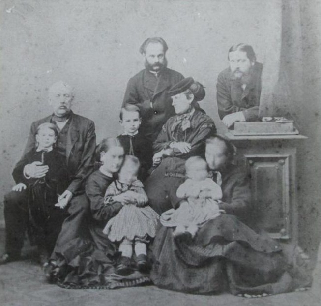 Александр Аркадьевич Суворов с семьей дочери Любови и сыном Аркадием